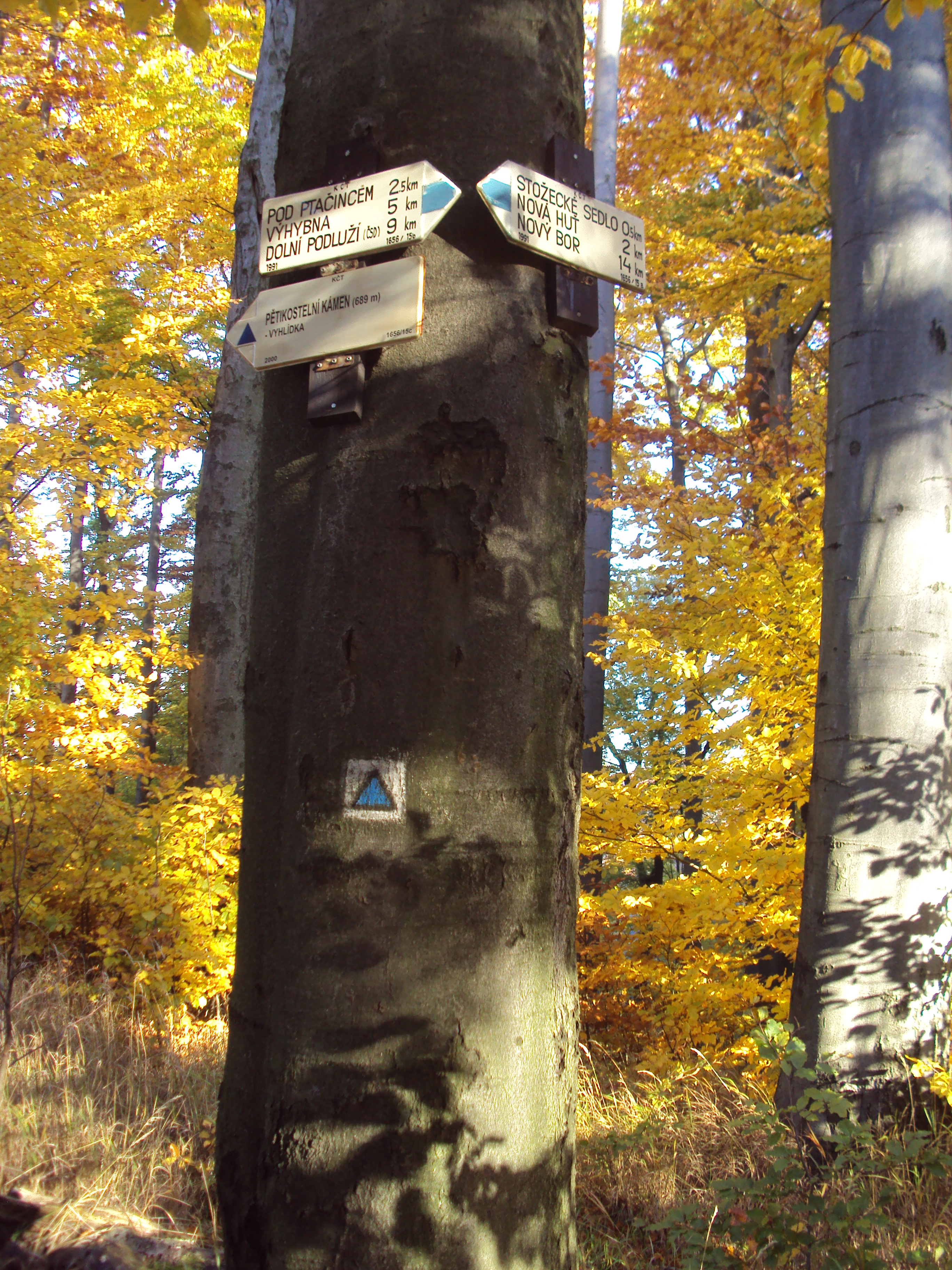 Rozcestník u lokality Pětikostelní kámen, katastr Dolní Podluží